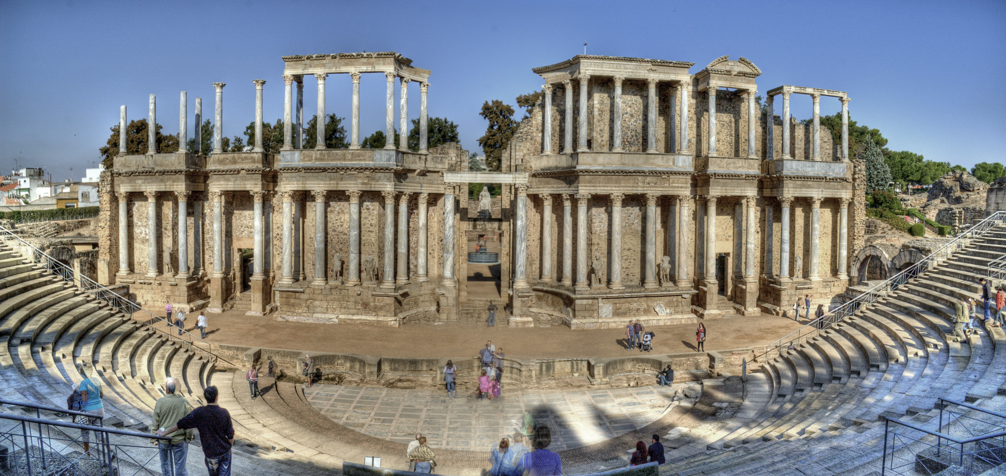 Su construcción se realizó en los años 16 y 15 a.C. El frente de la escena se introdujo a finales del siglo I o principios del II.